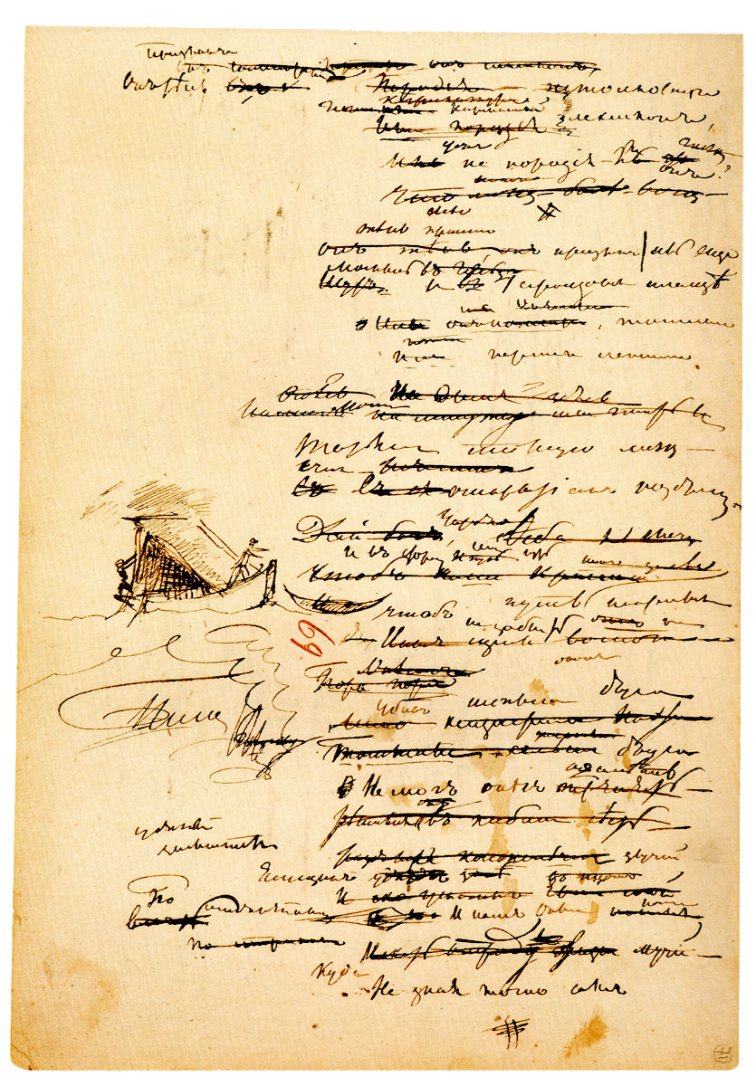 Pushkin_Evgeni_Onegin_VI_Boat.jpg